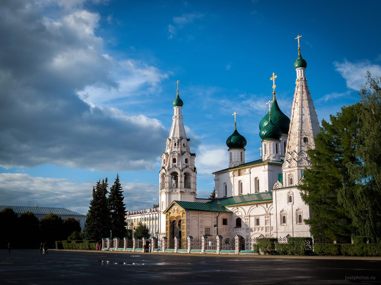 Церковь Ильи Пророка в Ярославле